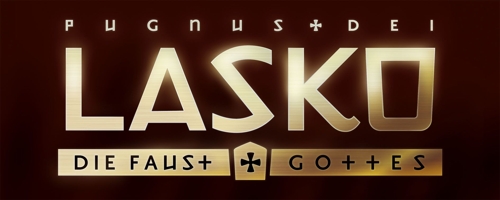 Logo der Serie Lasko – Die Faust Gottes